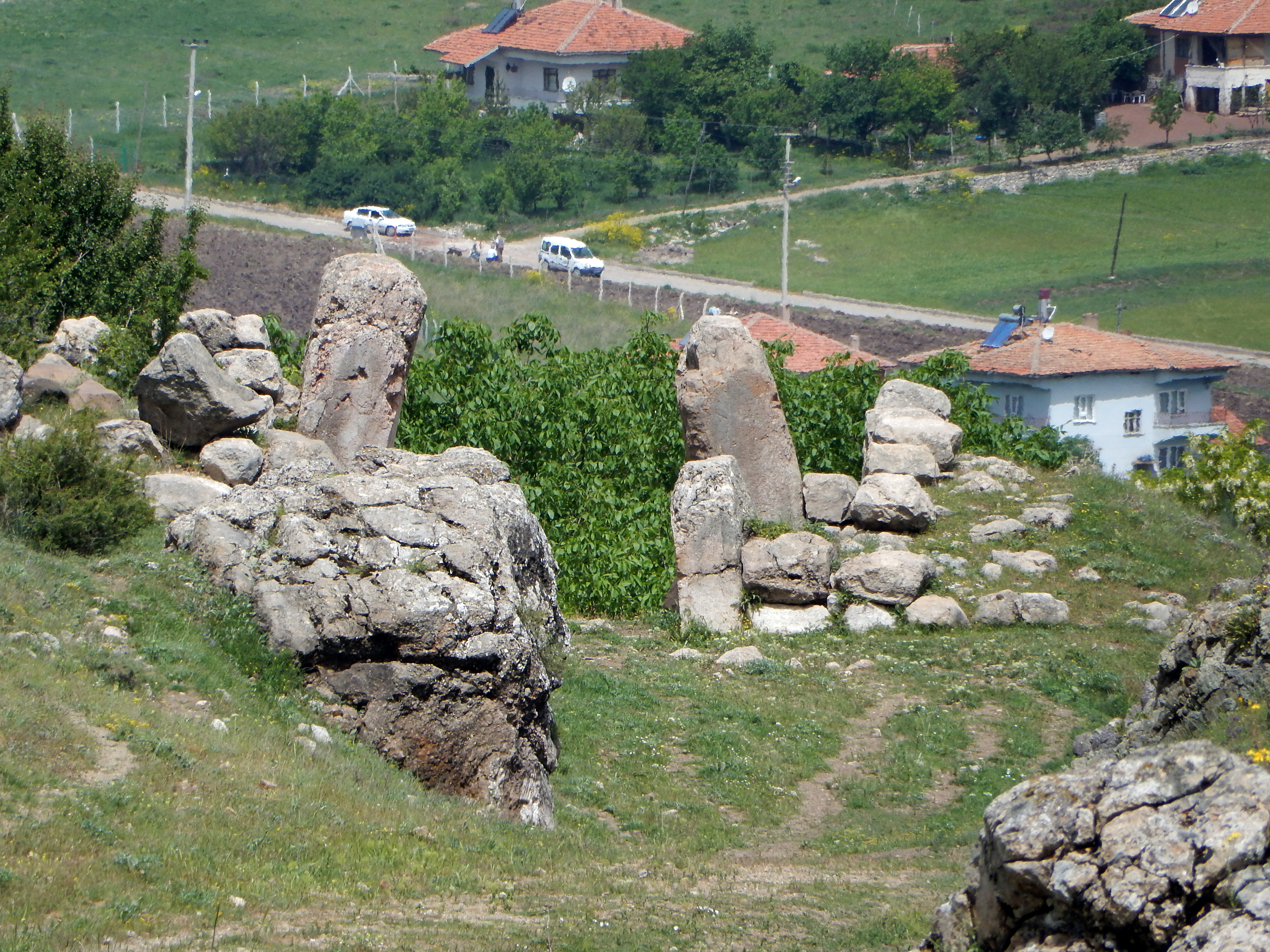 Ḫattuša, hethitische Hauptstadt bei Boğazkale, Zentraltürkei, Unteres Westtor